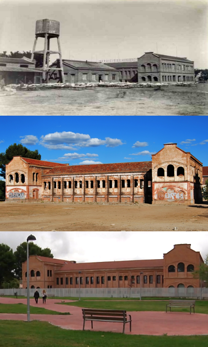 Evolución del Cuartel del Henares situado en el barrio de Los Manantiales (Guadalajara)